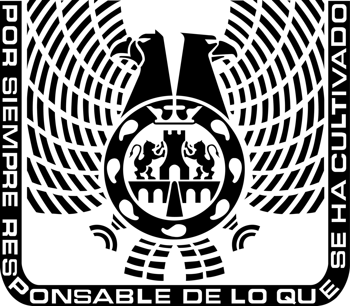 Escudo de la Universidad del Valle de México